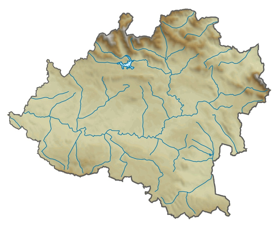 Mapa de la provincia de la provincia de Soria, Castilla y León, España.